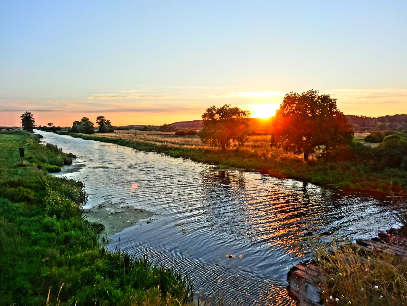 Zachód słońca nad Kanałem Bydgoskim na zachód od ujścia Kanału Noteckiego